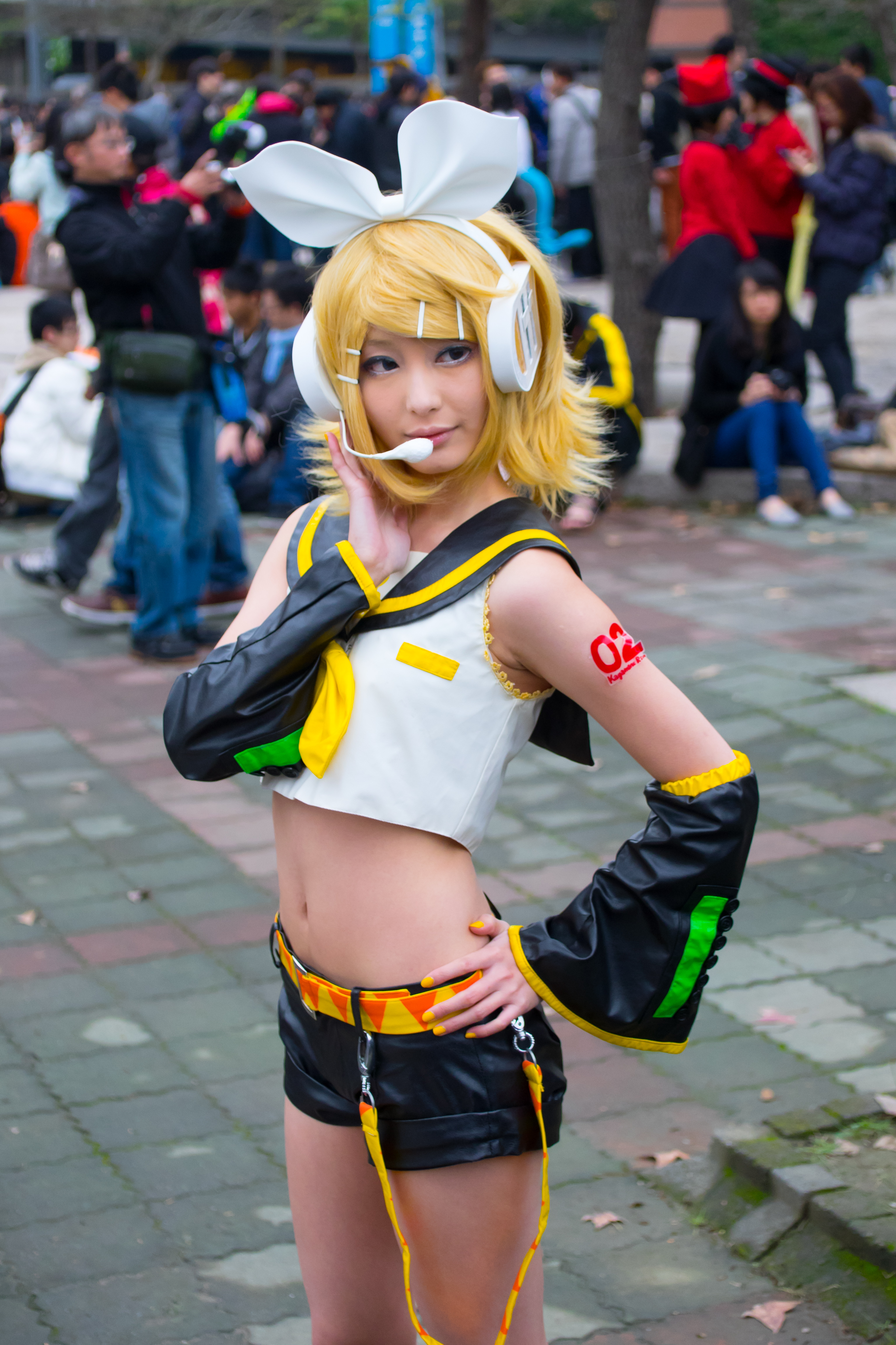 第23屆開拓動漫祭，鏡音鈴cosplayer。